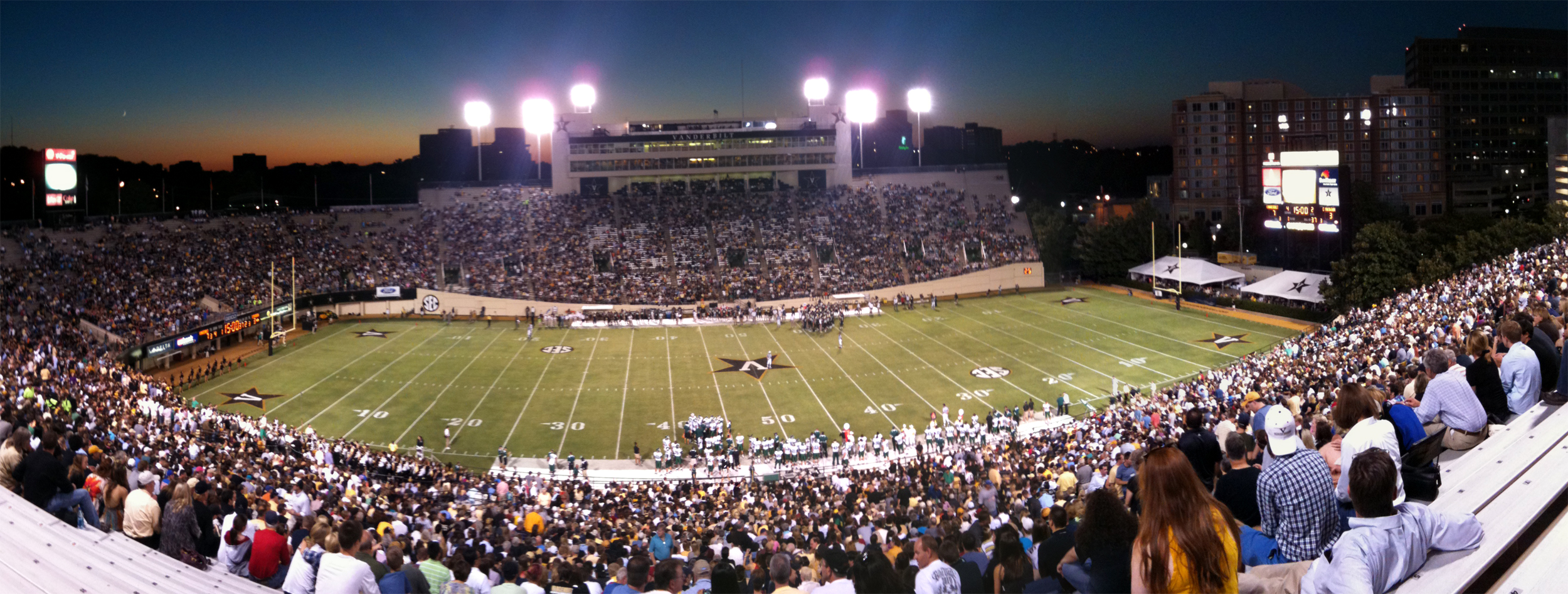 Vanderbilt 52, Eastern Michigan 6 Vanderbilt Stadium - Nashville, Tennessee October 09, 2010